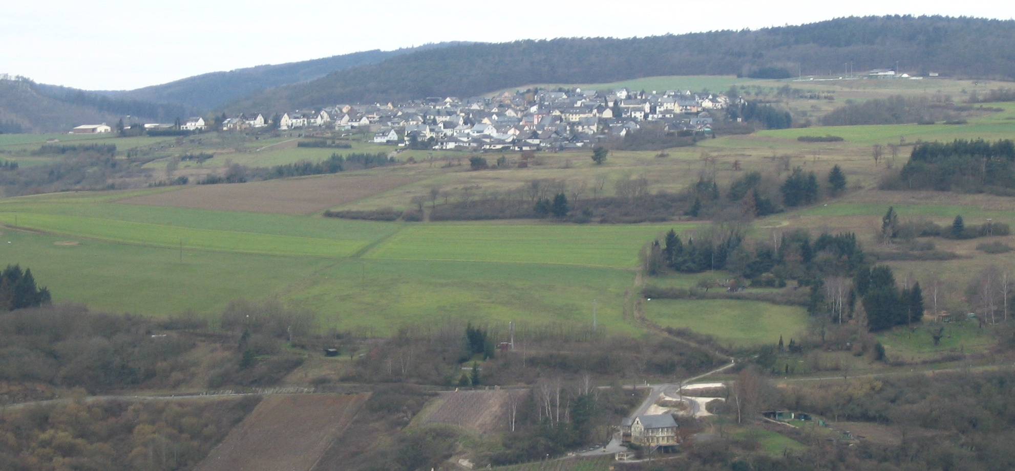 Damscheid, Rhein-Hunsrück-Kreis